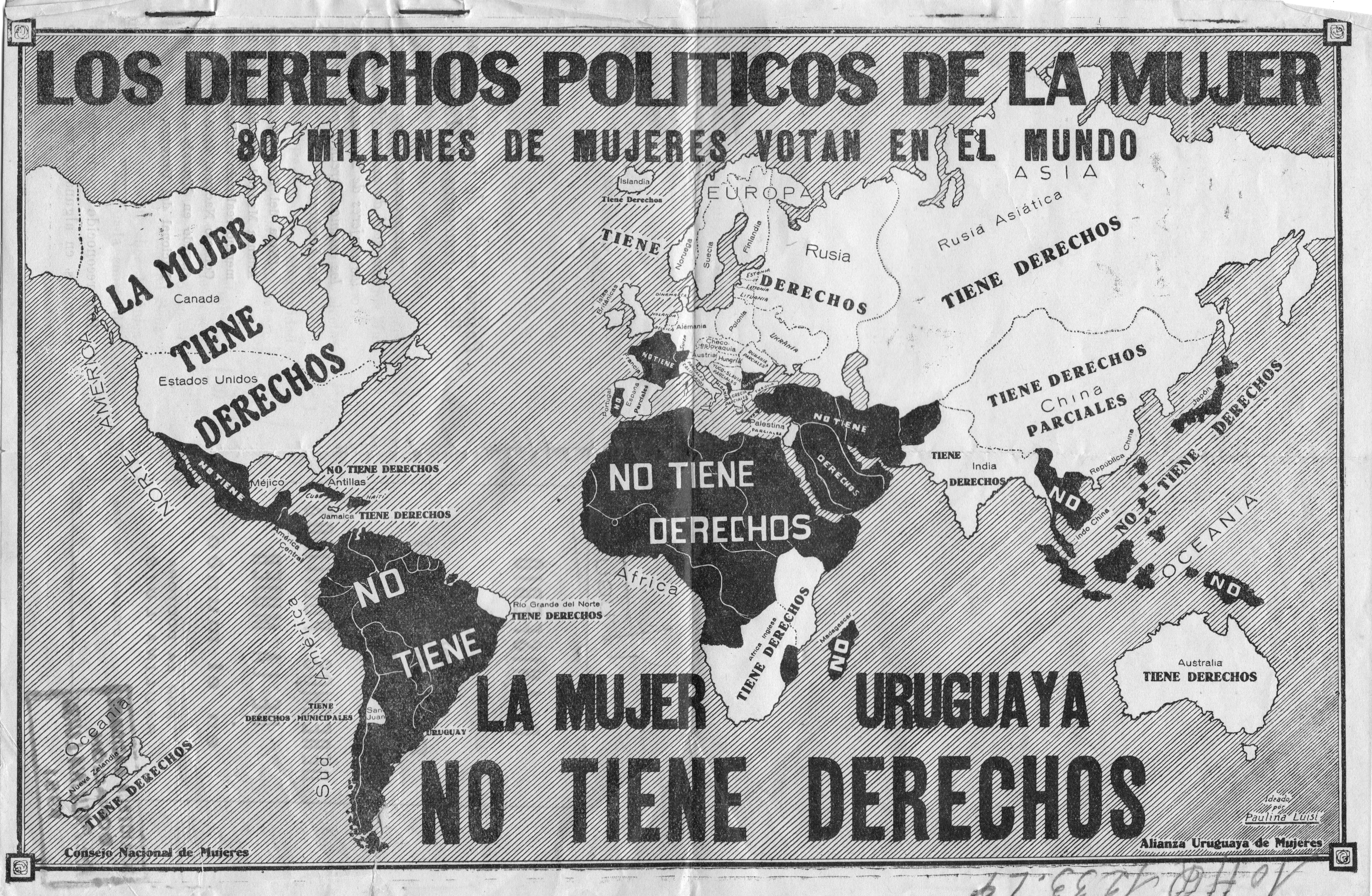 Mapa contenido en el librillo de Paulina Luisi "Planisferio indicando la posición actual de los derechos políticos de la mujer en el mundo", publicado en 1929.